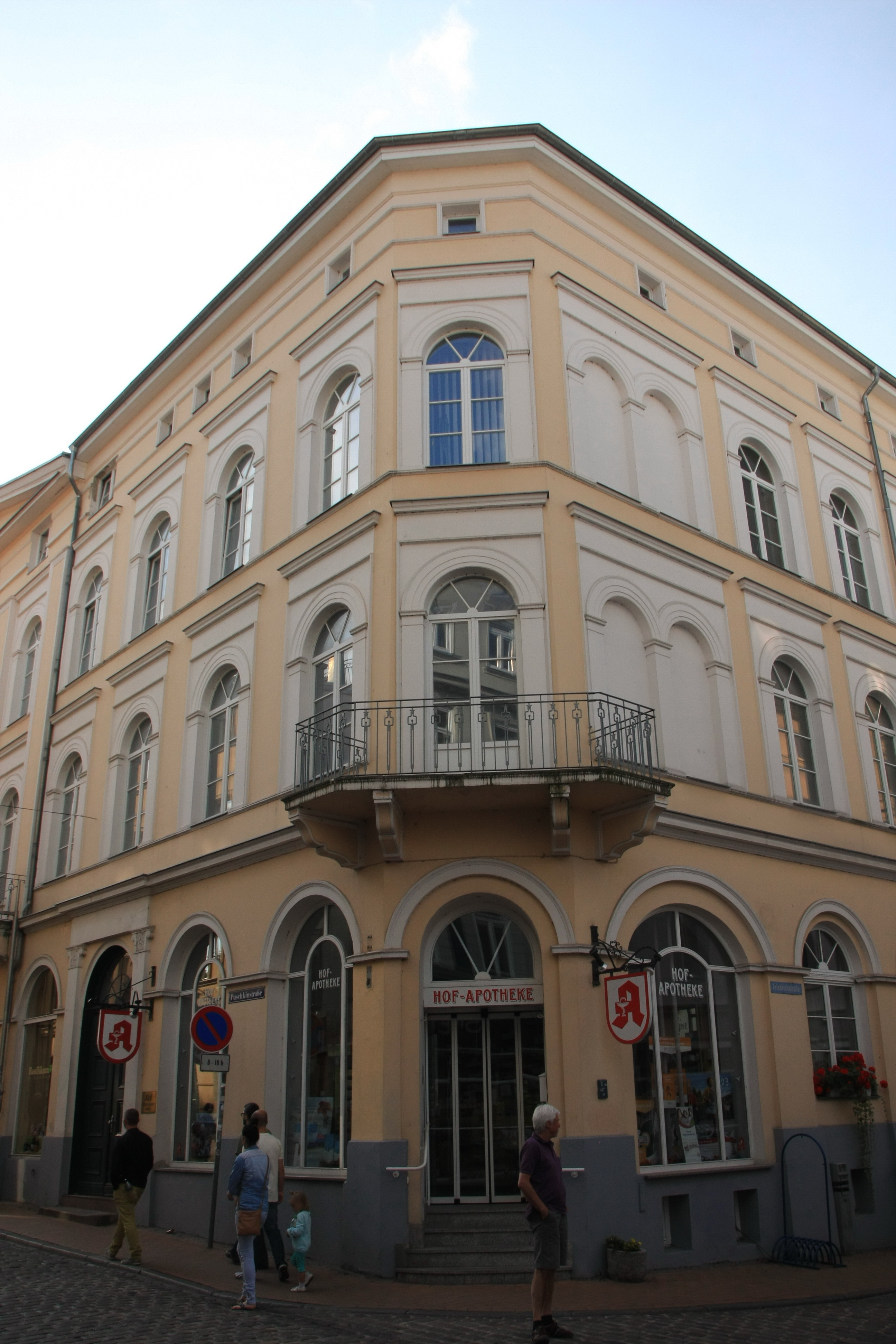 19055 Schwerin, Puschkinstraße 47